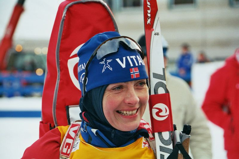 Liv Grete Poirée, Norway